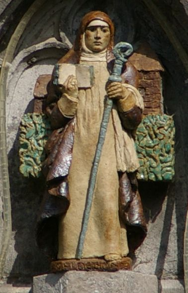 Statue de sainte Aldegonde, église de Noirchain (Belgique)